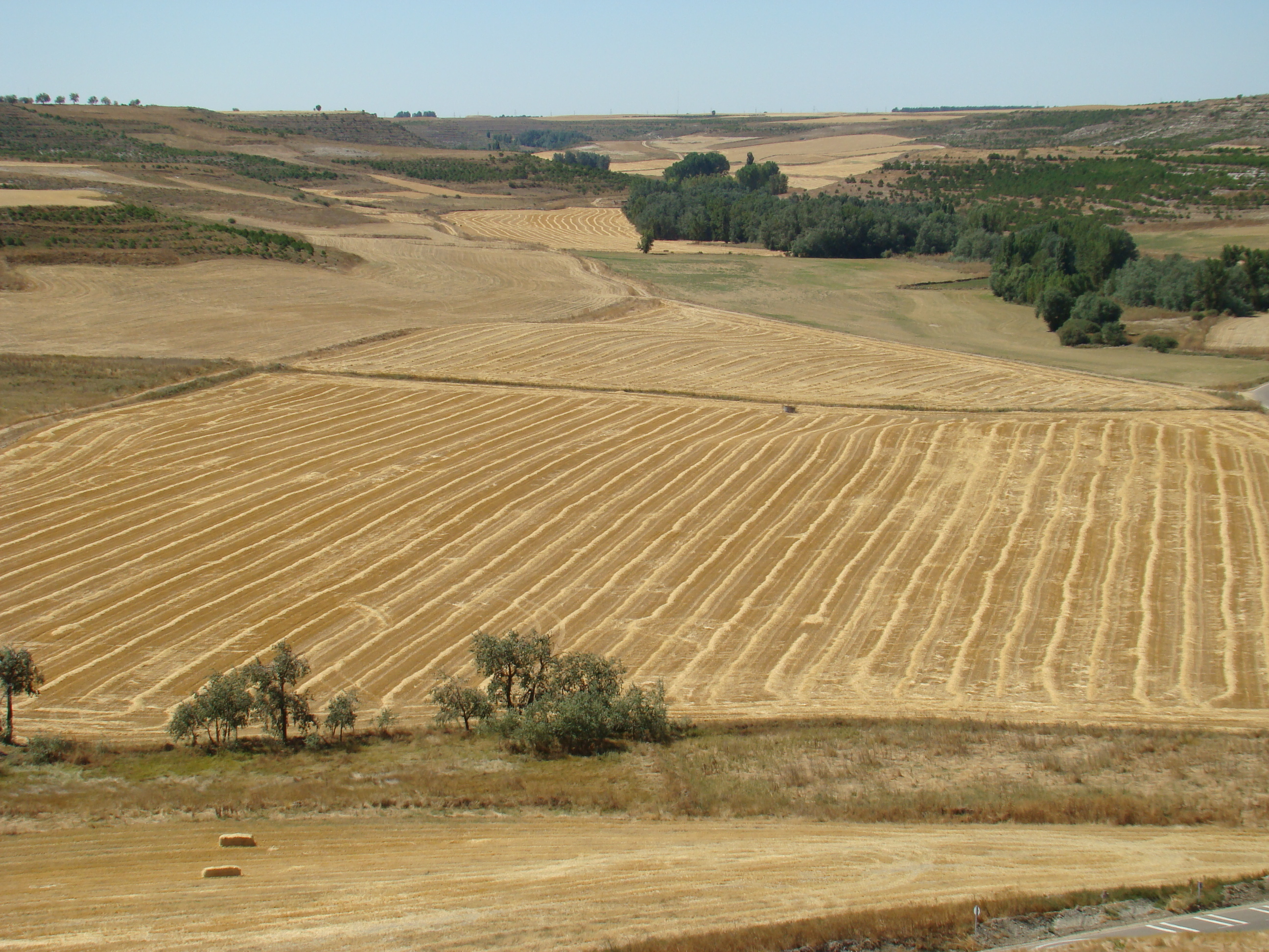 Montealegre de Campos en la provincia de Valladolid (España). Paisaje de campo segado.